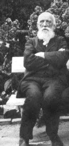 Pavel Jacobi